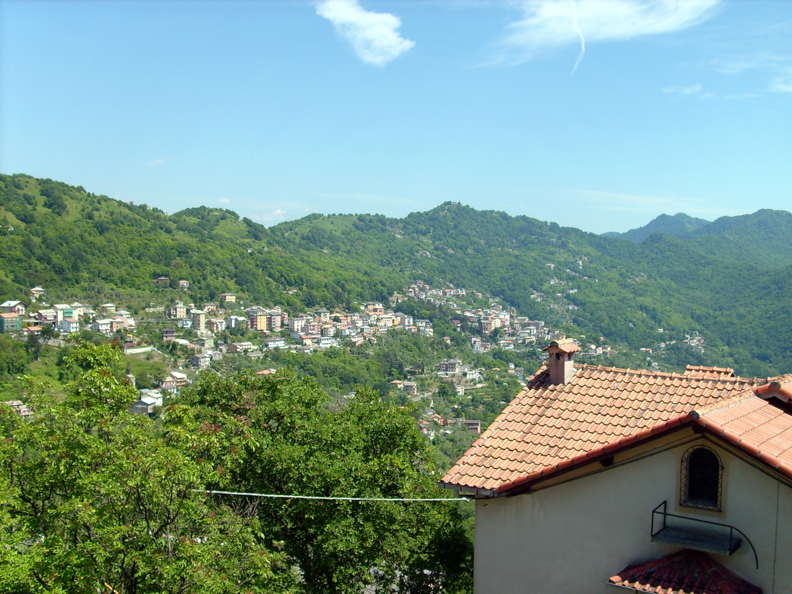 Panorama di Uscio, Liguria, Italia